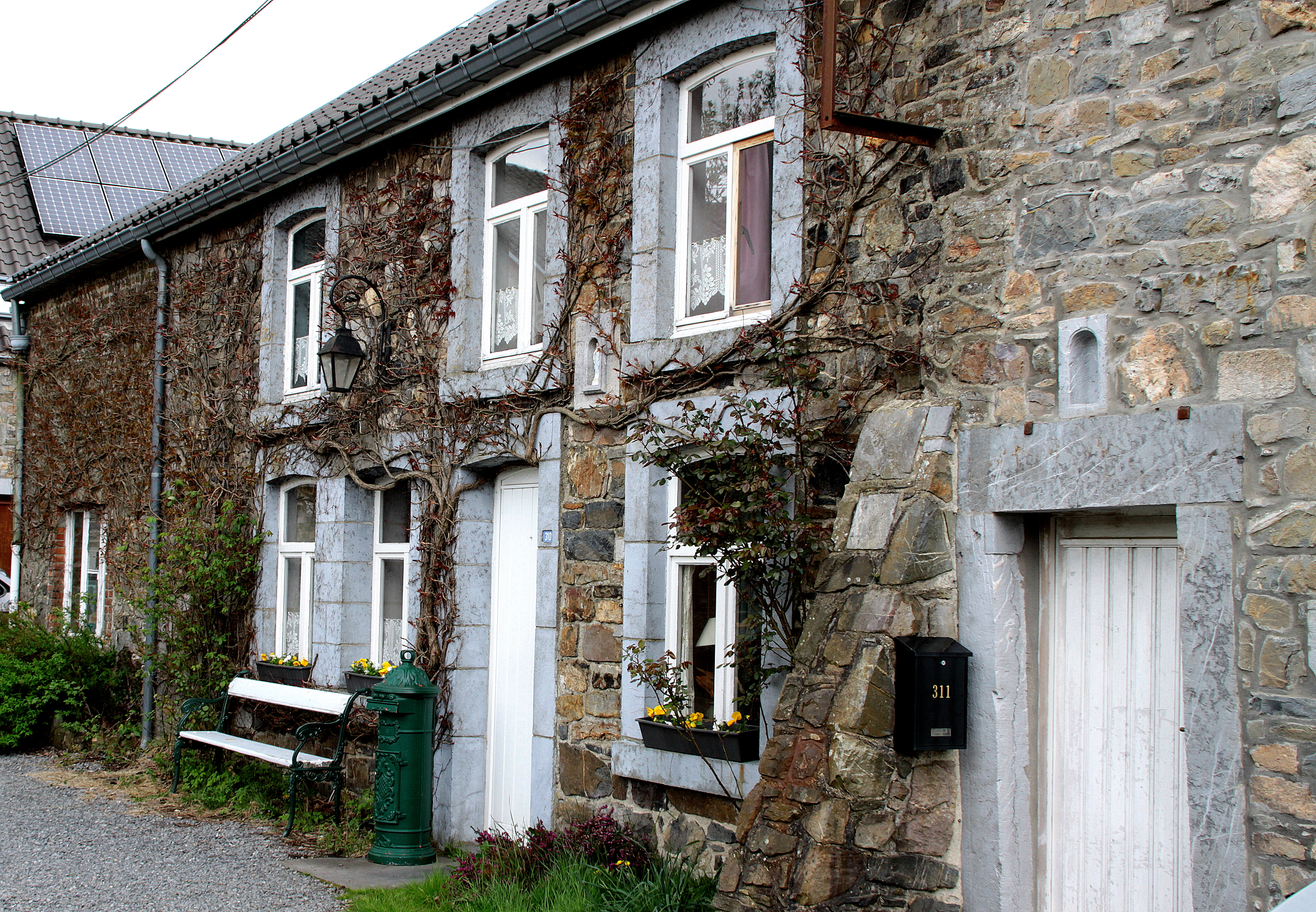 En Haus an der Cour zu Vert Buisson